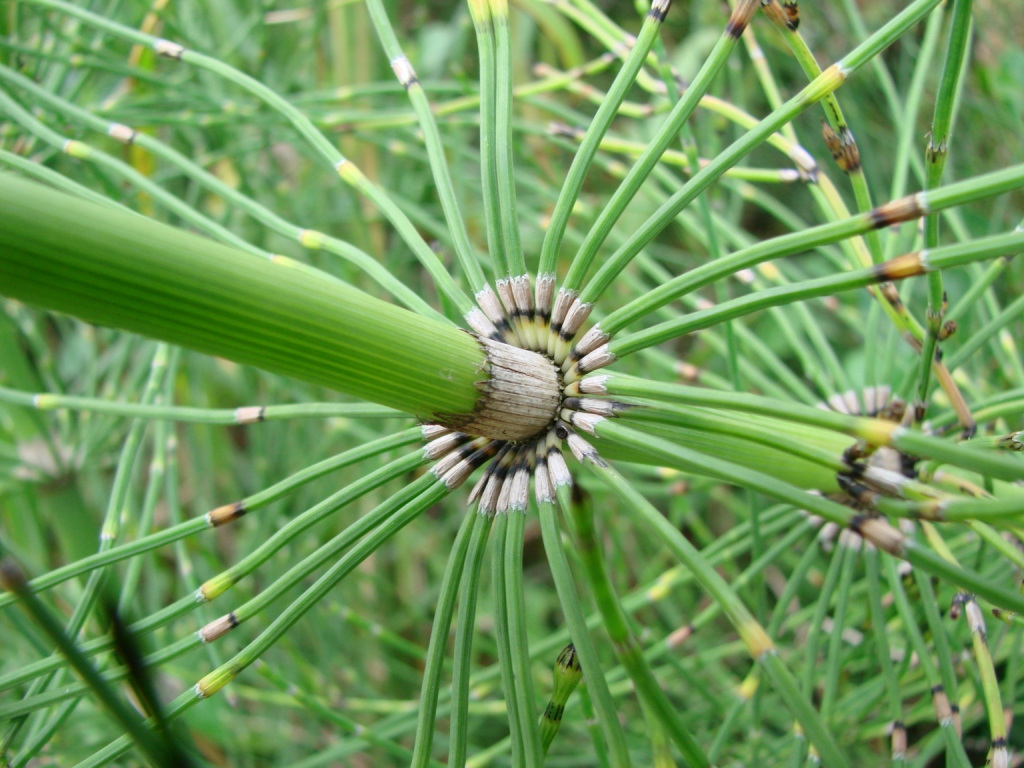 Equisetum giganteum - EQUISETACEAE Praia do Mo�ambique - Florian�polis - SC - Brasil